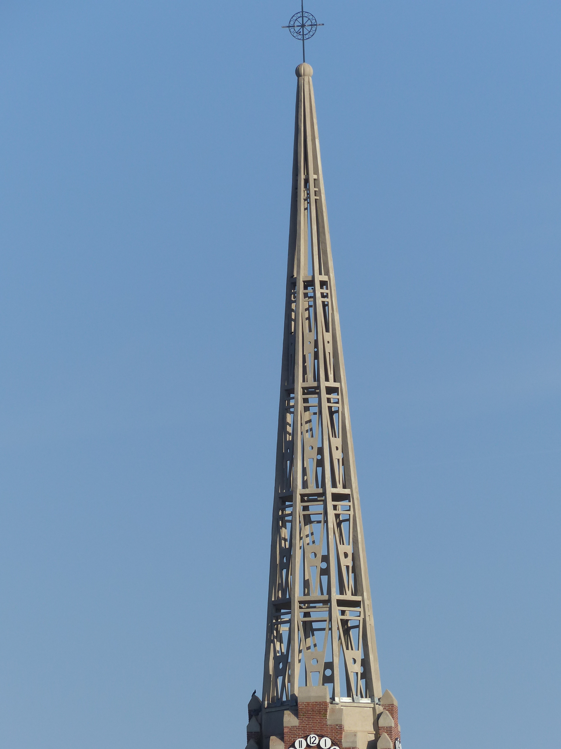 Clocher de l'Eglise St-Pierre de Lamotte-Warfusée